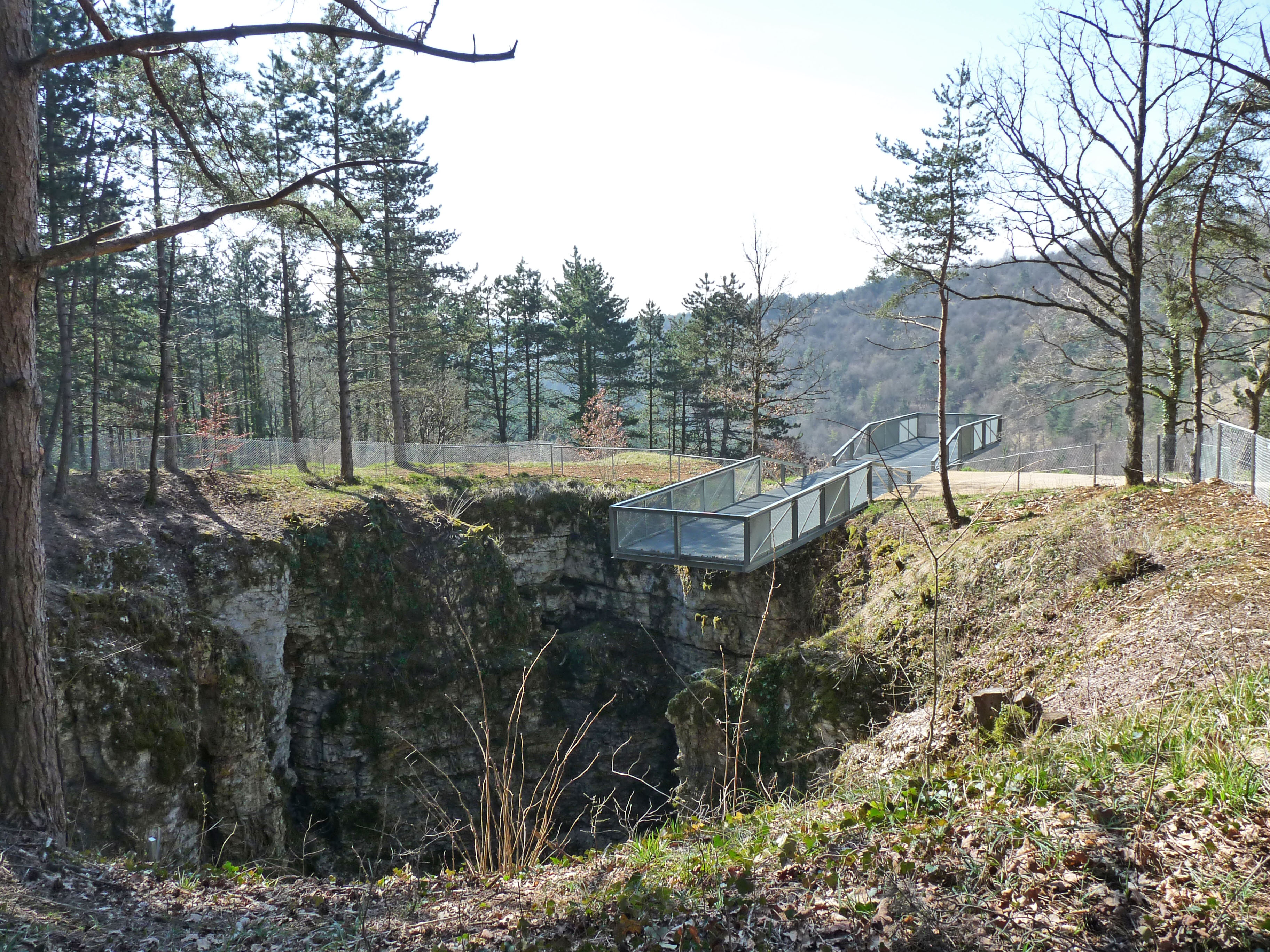 Belvédère pour l'observation des vestiges d'anciennes mines de fer aux lacets de Mélaire près de Poissons (Haute-Marne).